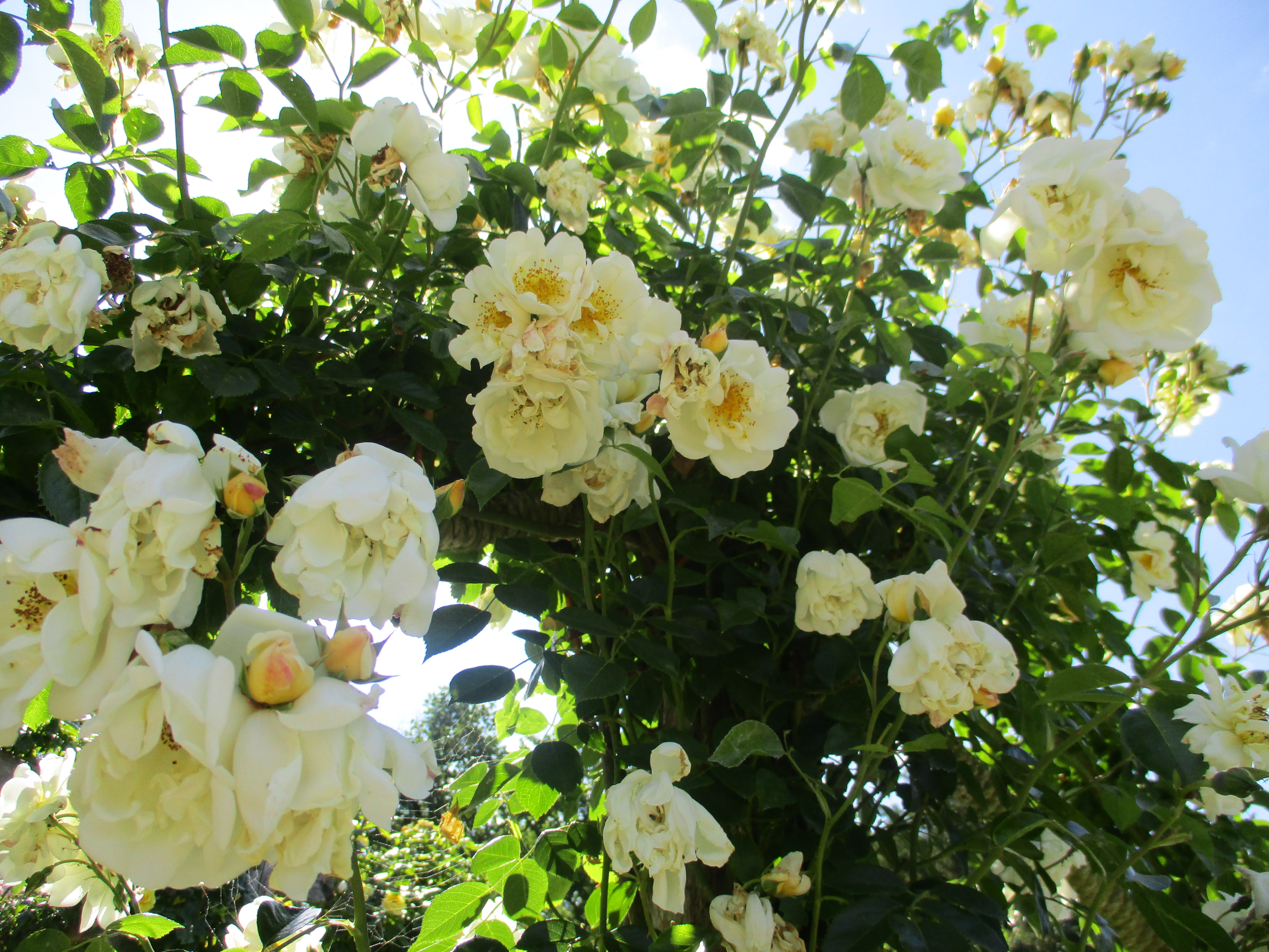 Rose 'François Guillot' (Barbier, 1907). Roseraie de Bagatelle.